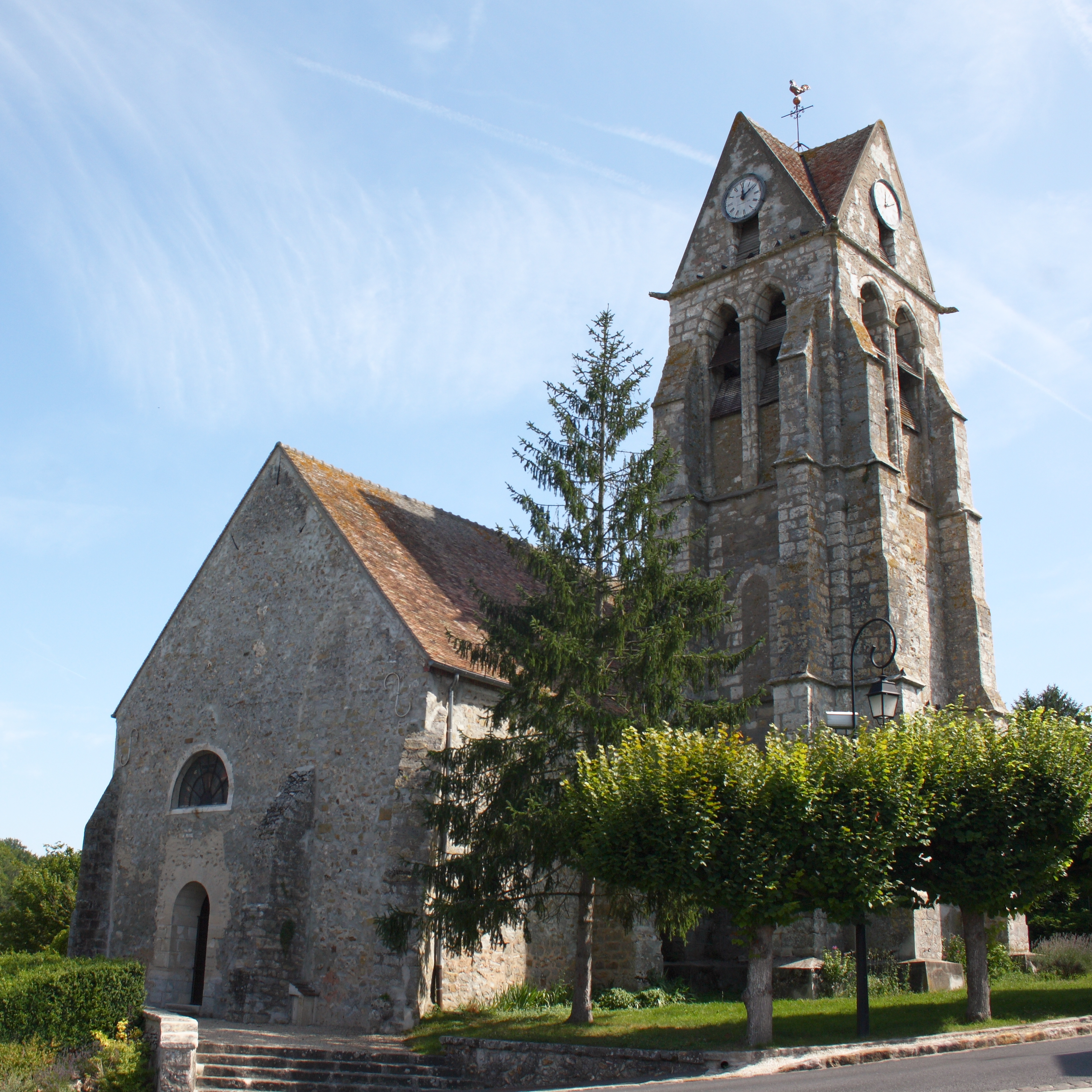 katholische Pfarrkirche St. Martin in Fontaine-le-Port im Département Seine-et-Marne (Île-de-France)